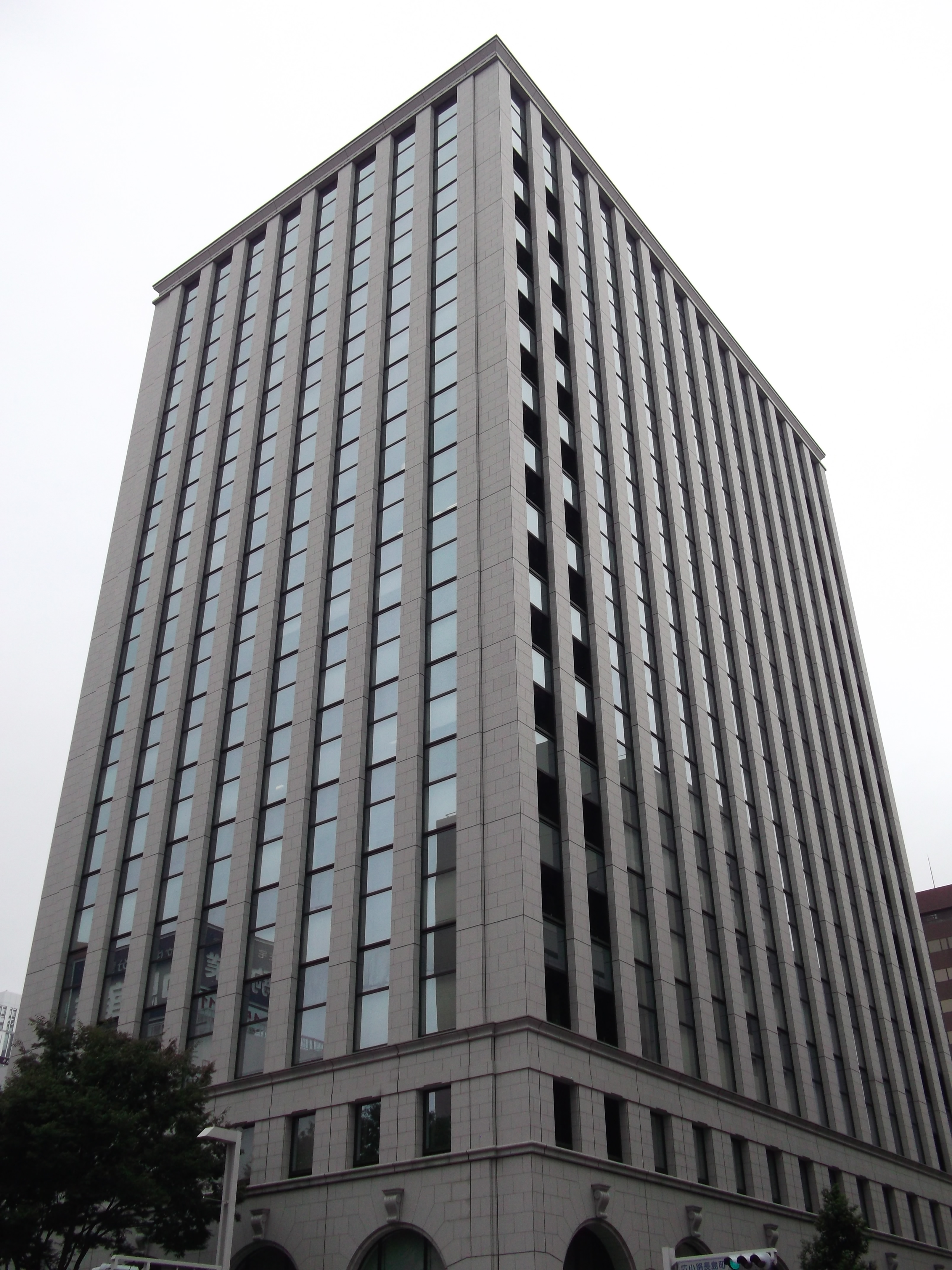 名古屋市中区の三井住友銀行名古屋ビルを南東角より撮影